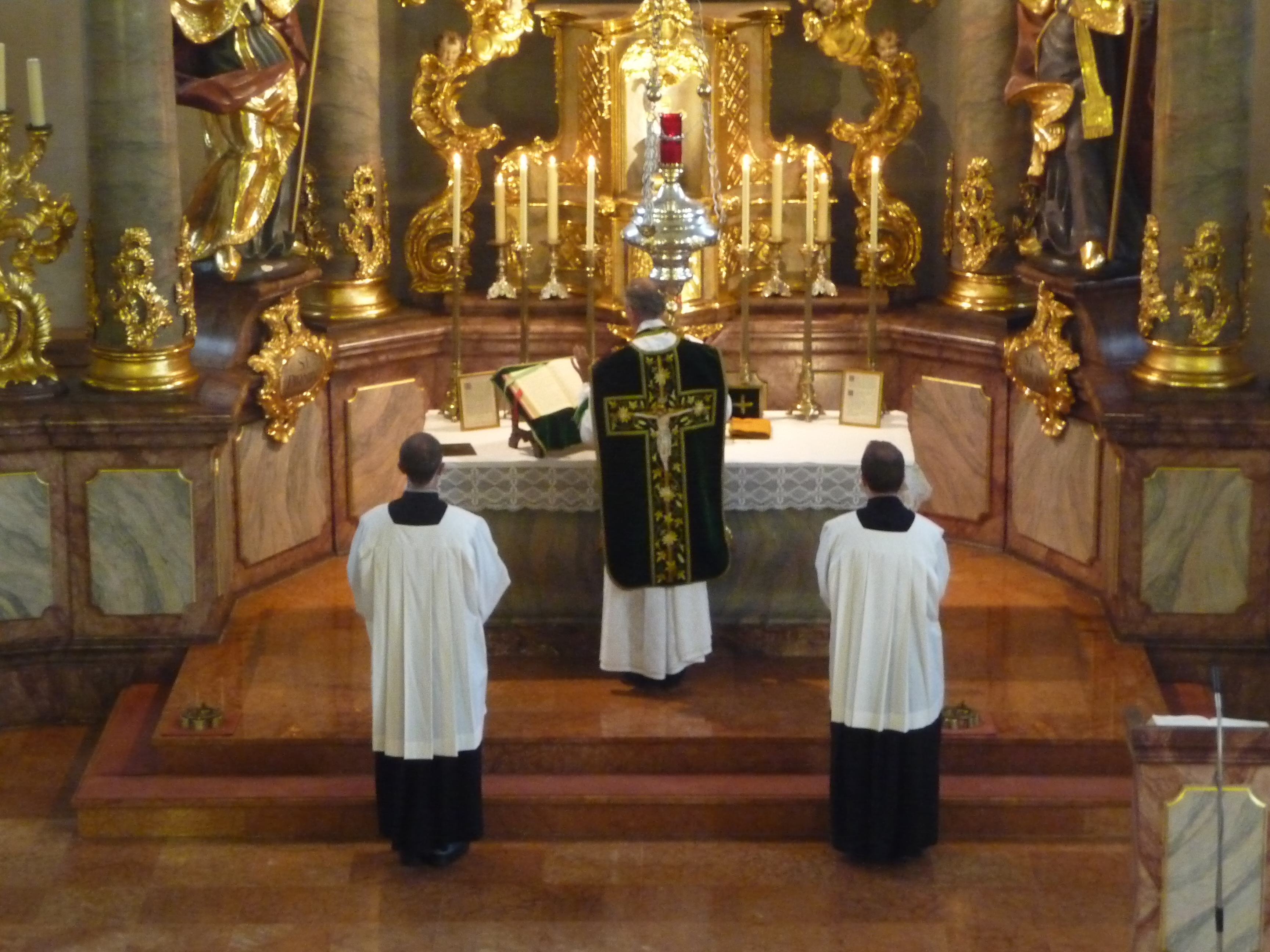 Tridentinische Messe, August 2009